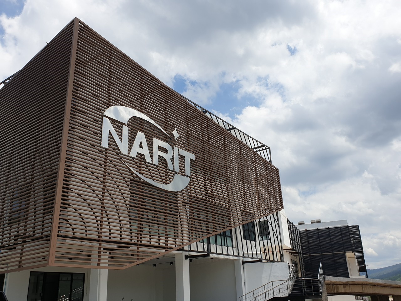 สำนักงานใหญ่ สถาบันวิจัยดาราศาสตร์แห่งชาติ